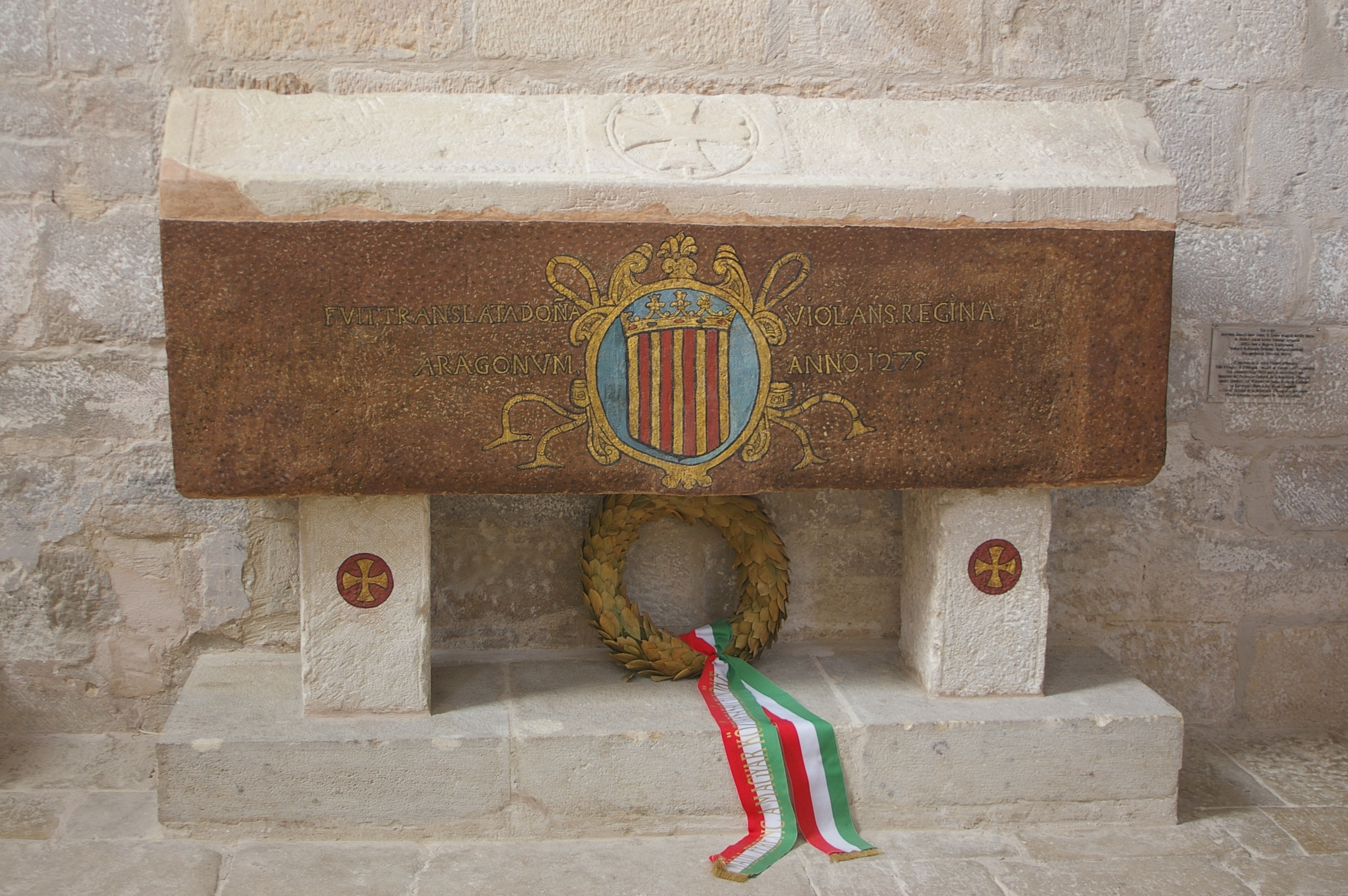 Tumba de Violante de Hungría, en el monasterio de Vallbona de les Monges, en Lleida. La tumba tiene un escudo de Aragón. Se ve una corona fúnebre con una cinta con los colores de la bandera de Hungría.